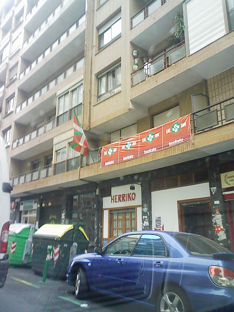 Herriko Taberna de Santutxu exhibiendo carteles de la lista ilegalizada de ANV para la alcaldía de Bilbao; elecciones municipales del 2007.